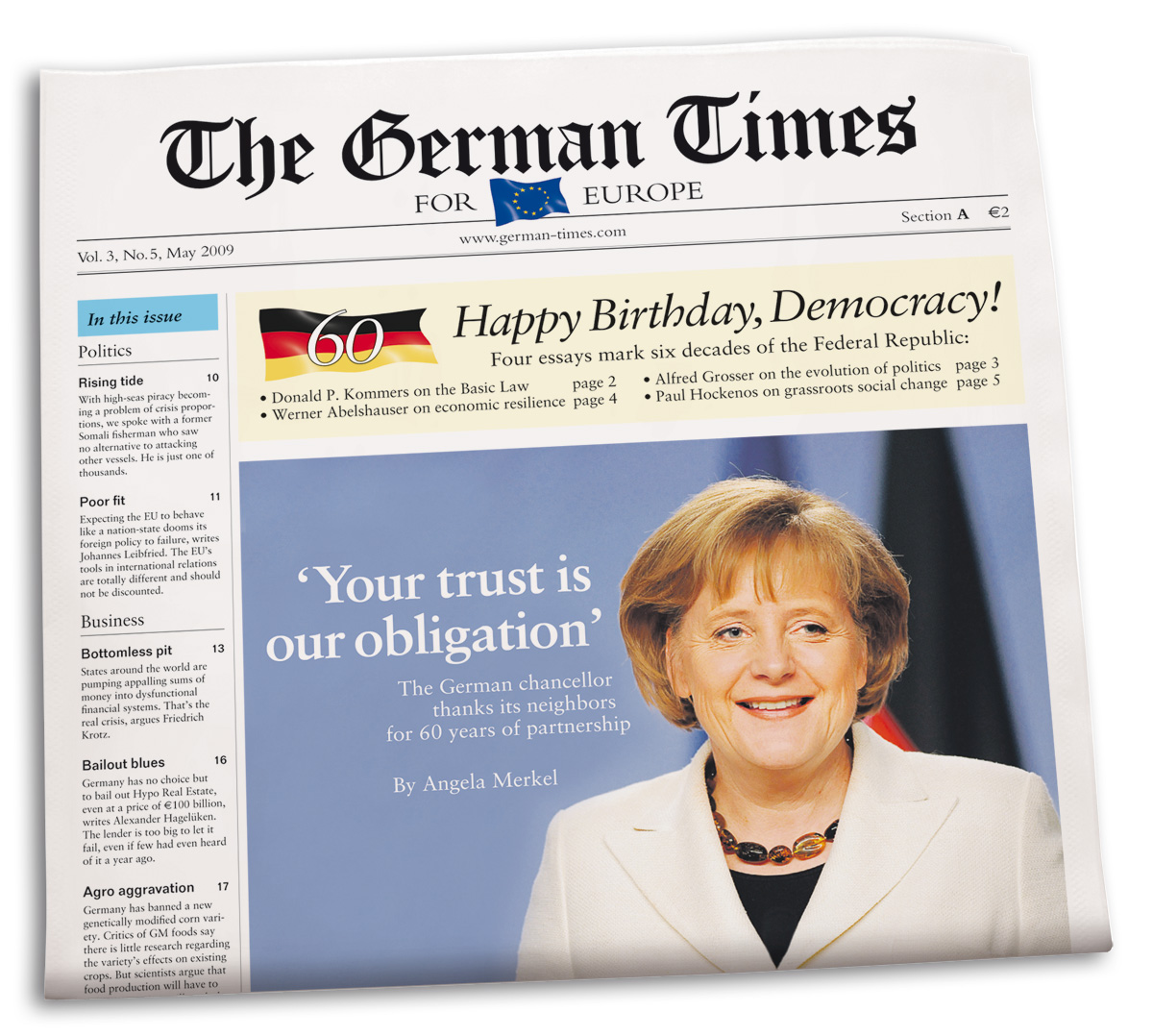 Faksimile des Titelbildes von The German Times, Ausgabe Mai 2009